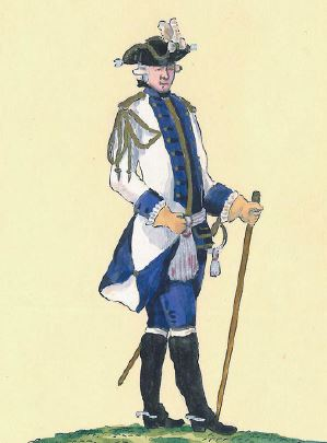 Adiutant koronny w niemieckim mundurze (generał adiutant króla w mundurze cudzoziemskim)